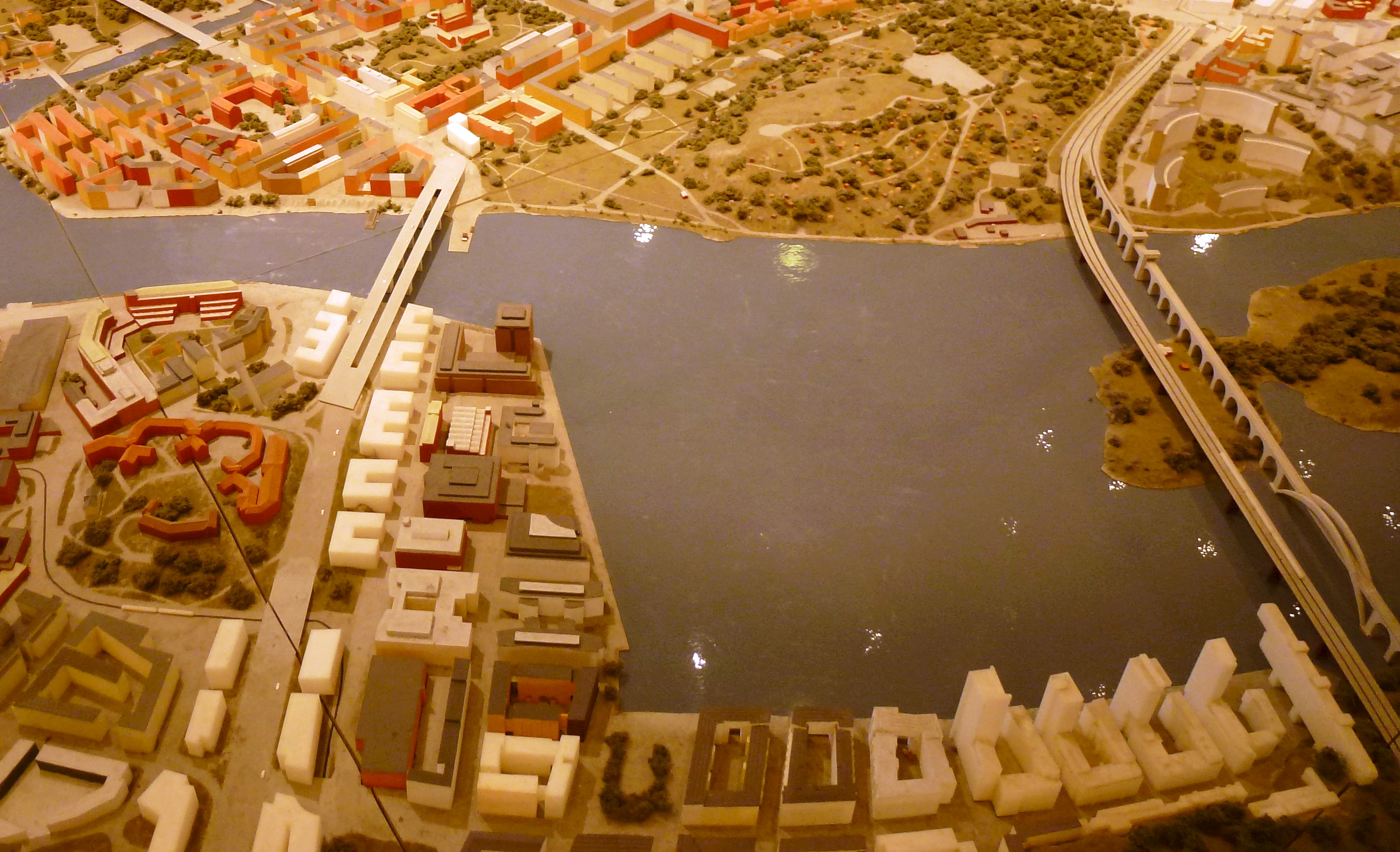 Framtida Marievik och Årstadalshamnen, modell på Kulturhuset, Stockholm